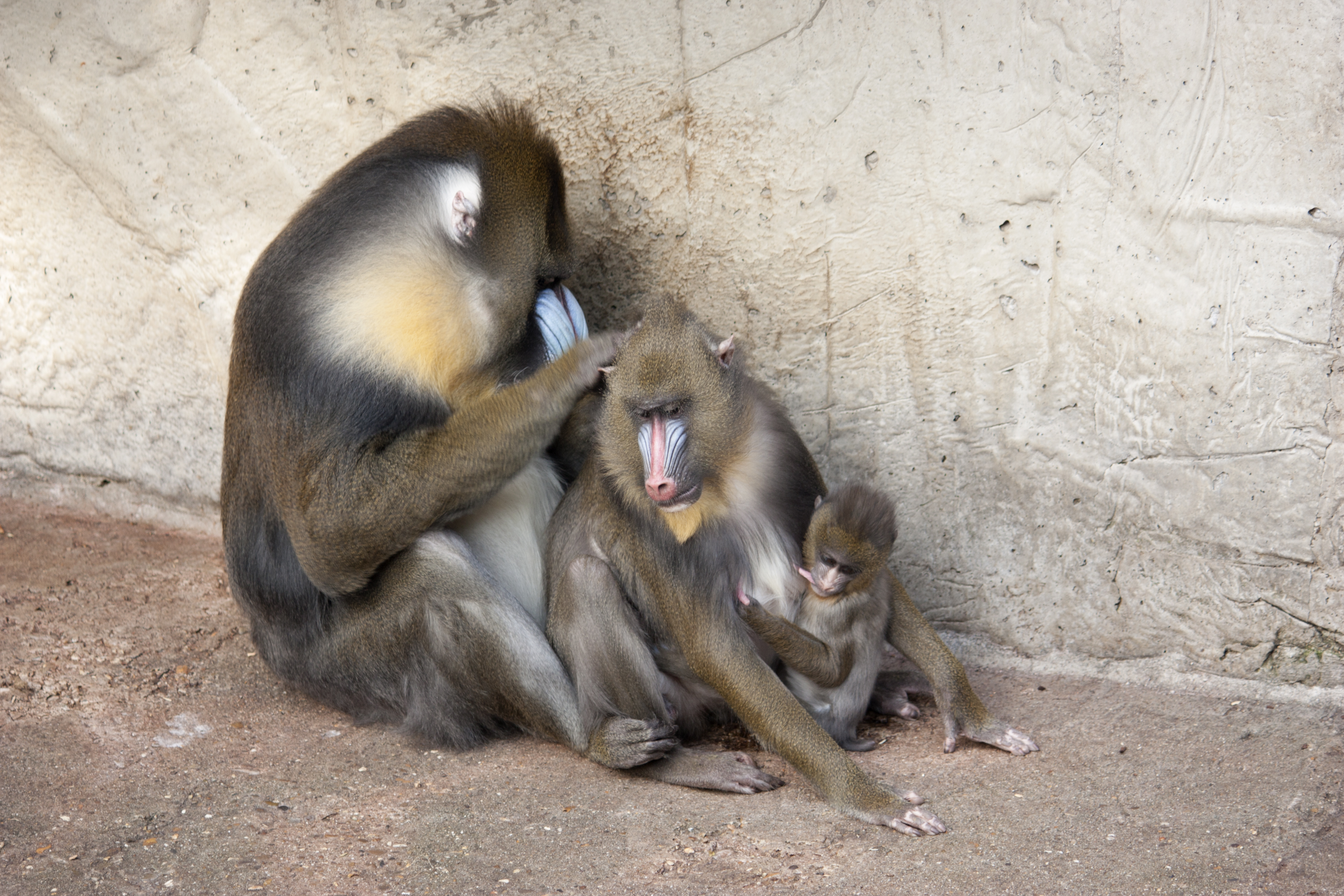 Artis Royal Zoo - Amsterdam - The Netherlands